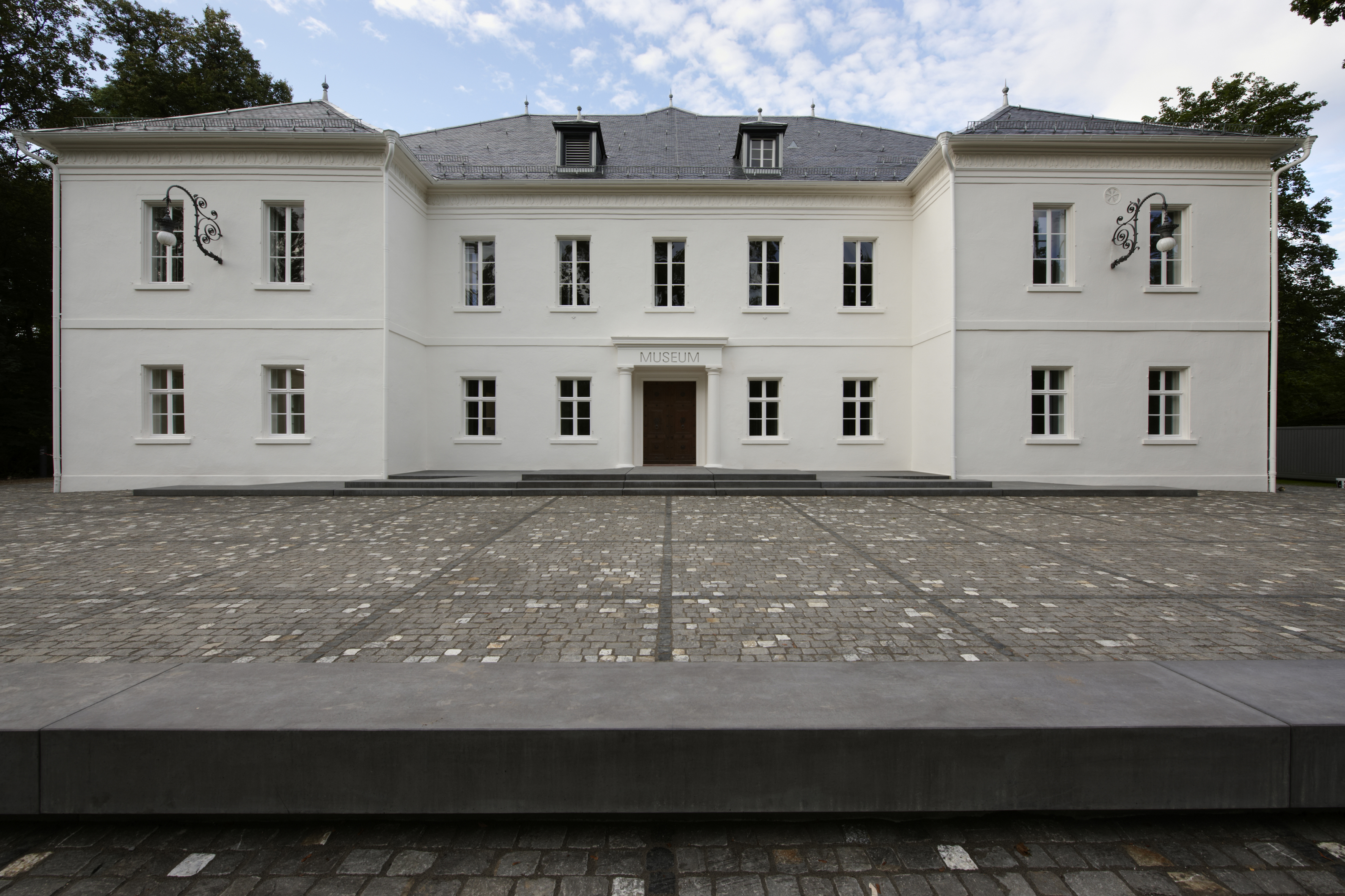 Museum Art.Plus in Donaueschingen